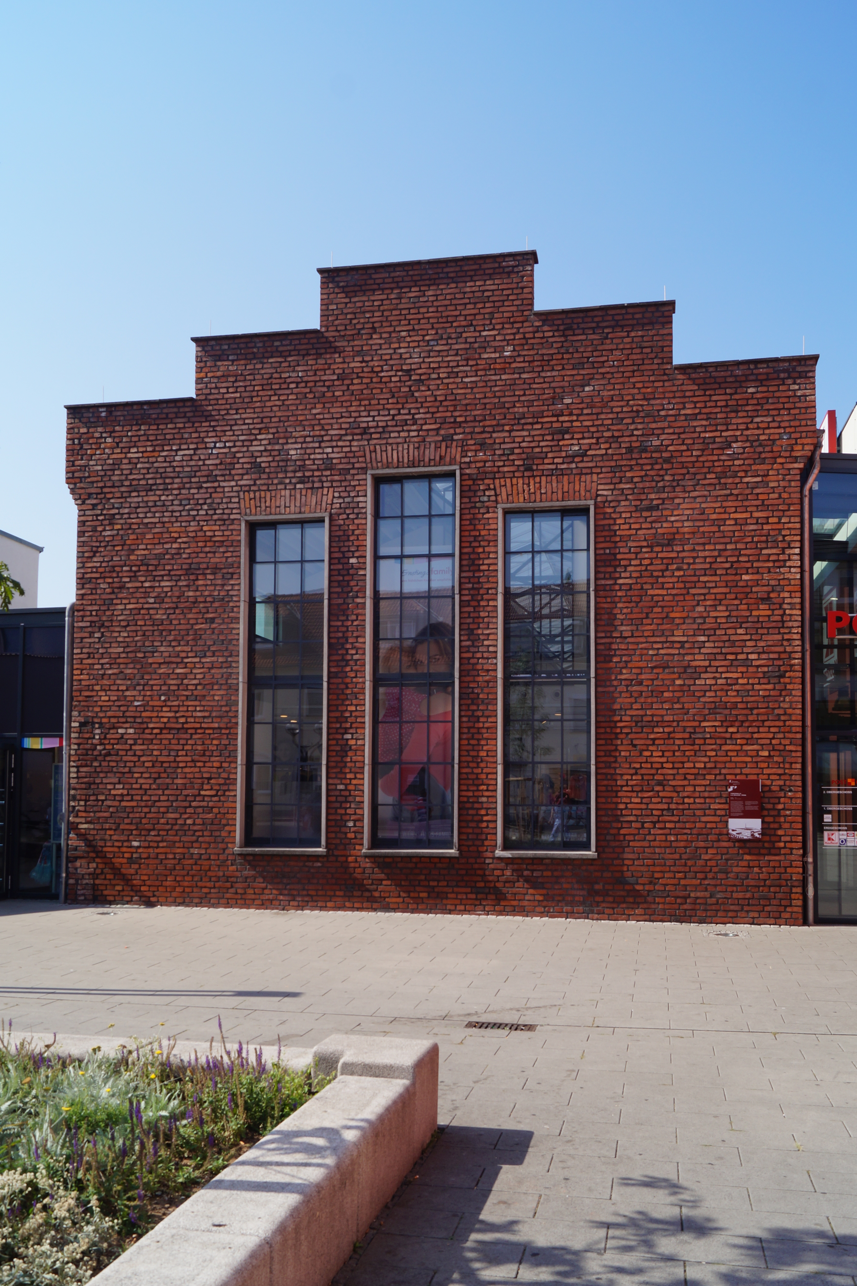 Ehemalige Bracker Maschinenhalle, Fischerstraße 5 in Hanau, Ansicht von Osten